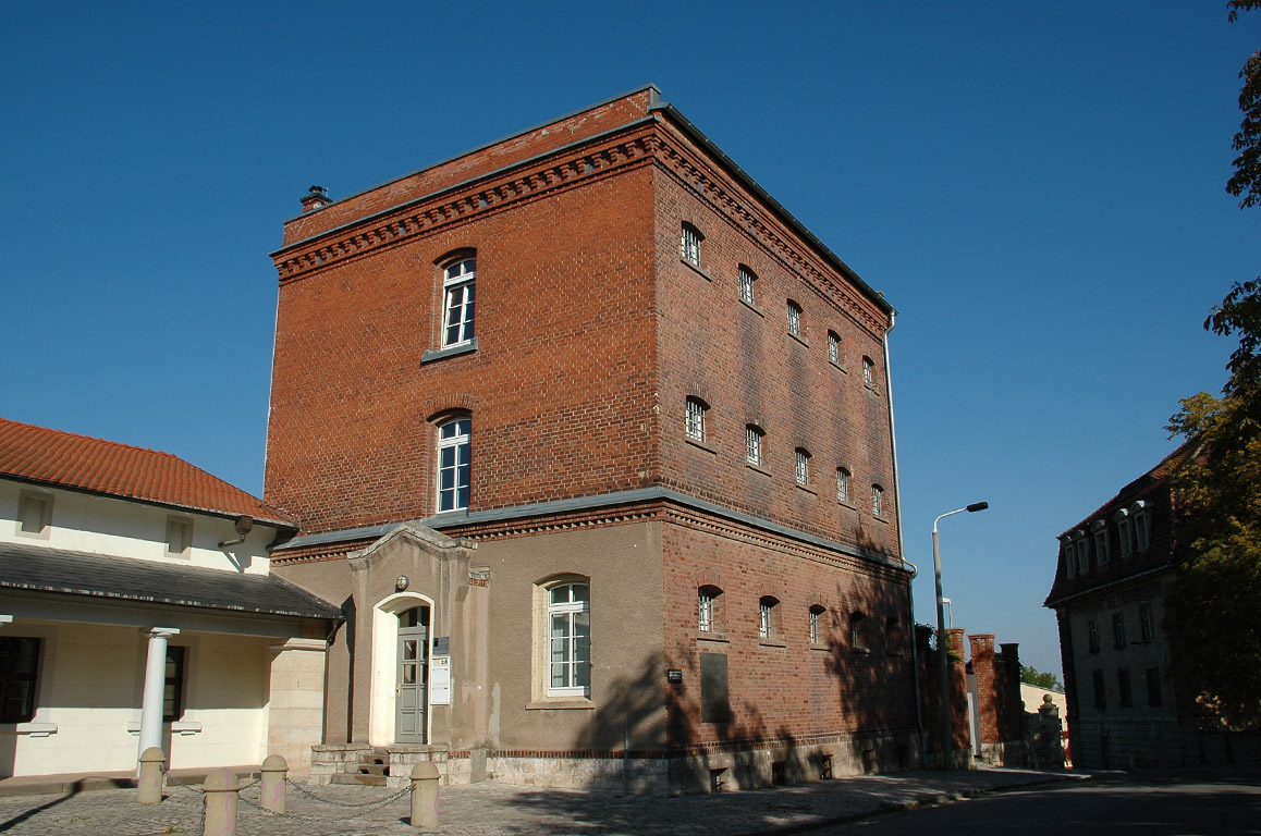 Militärarrestanstalt mit Gefängnishof (errichtet zwischen 1913 und 1914) in der Zitadelle Petersberg in Erfurt